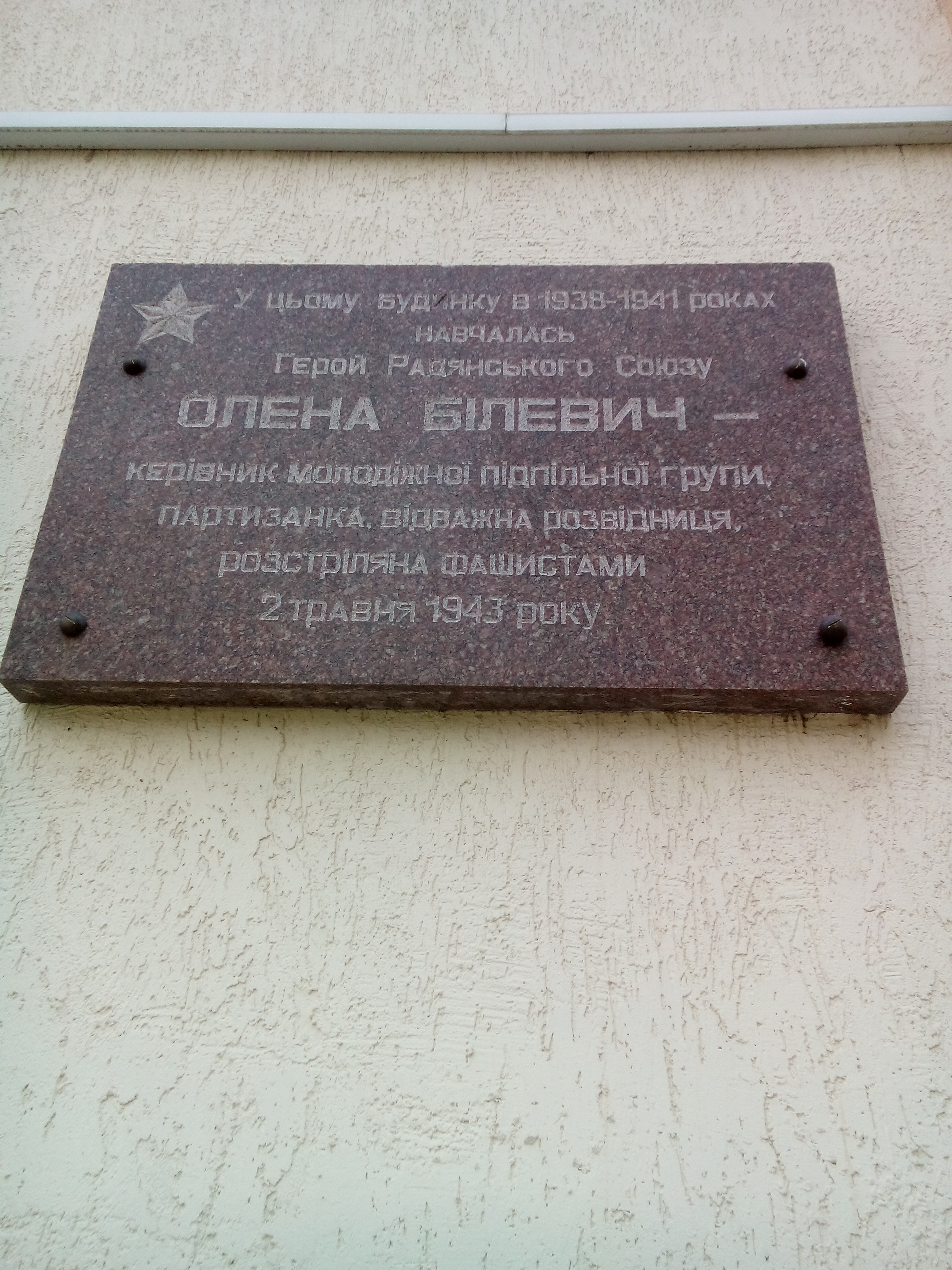 Будинок, в якому навчалась О. Білевич – юна партизанка-розвідниця, Чернігів, проспект Миру, 137